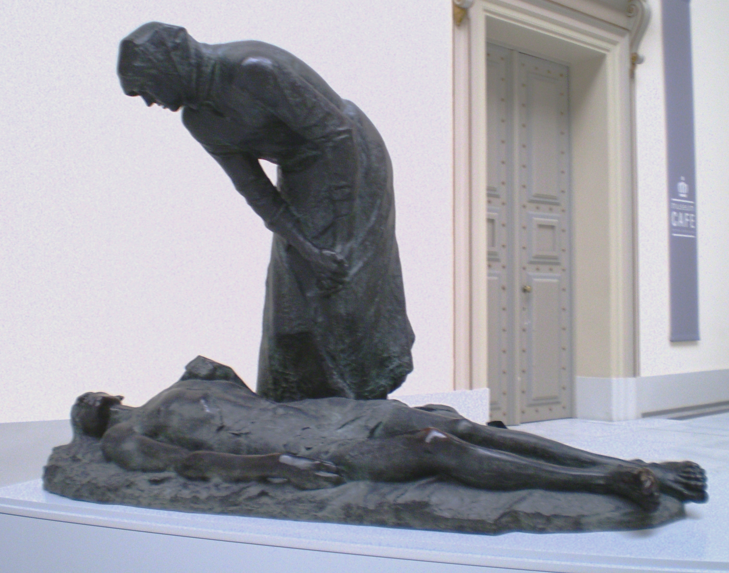 Le grisou (1888-1890) œuvre de Constantin Meunier (1831–1905)